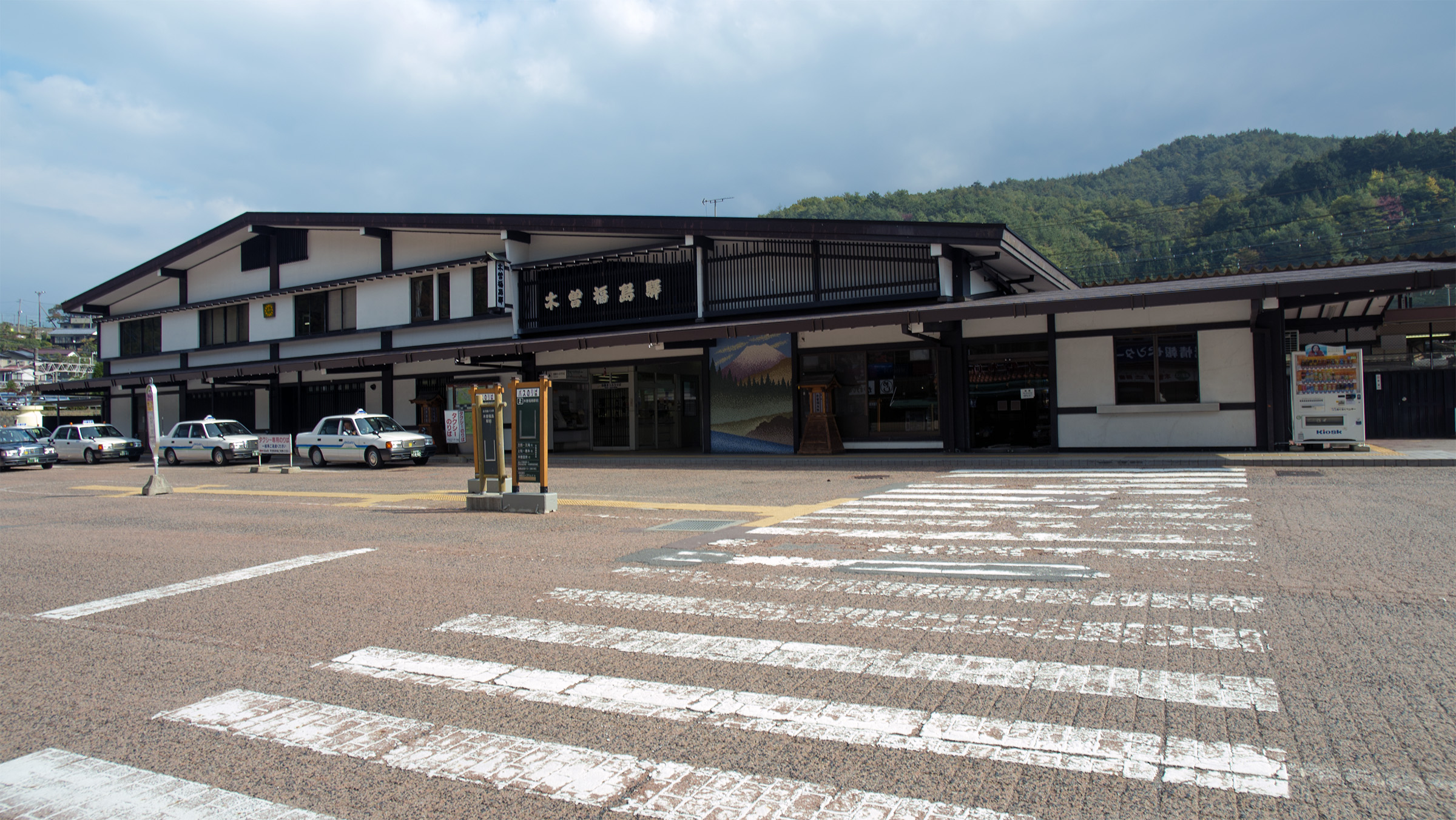 東海旅客鉄道株式会社中央本線木曽福島駅